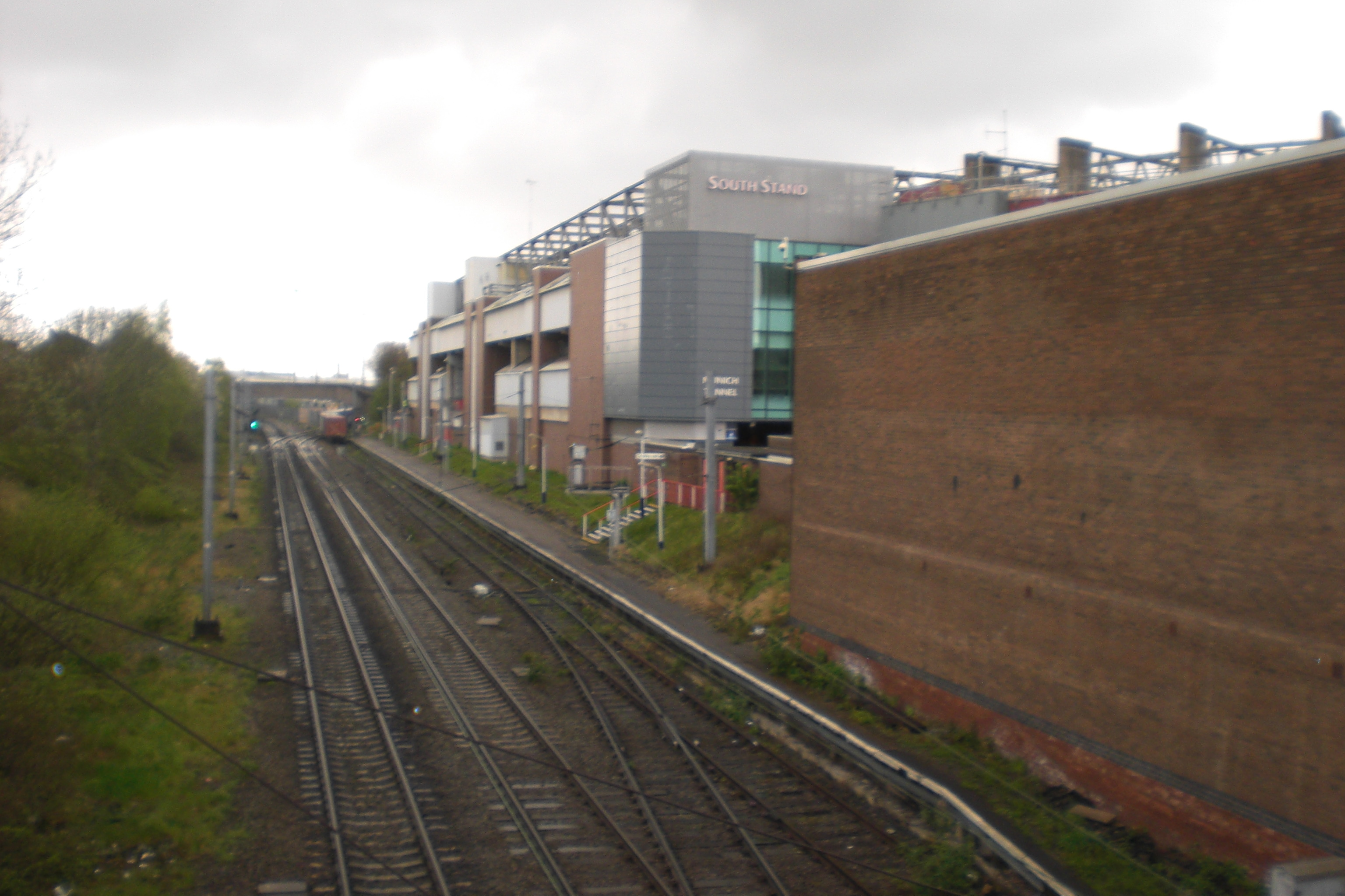 Old Trafford